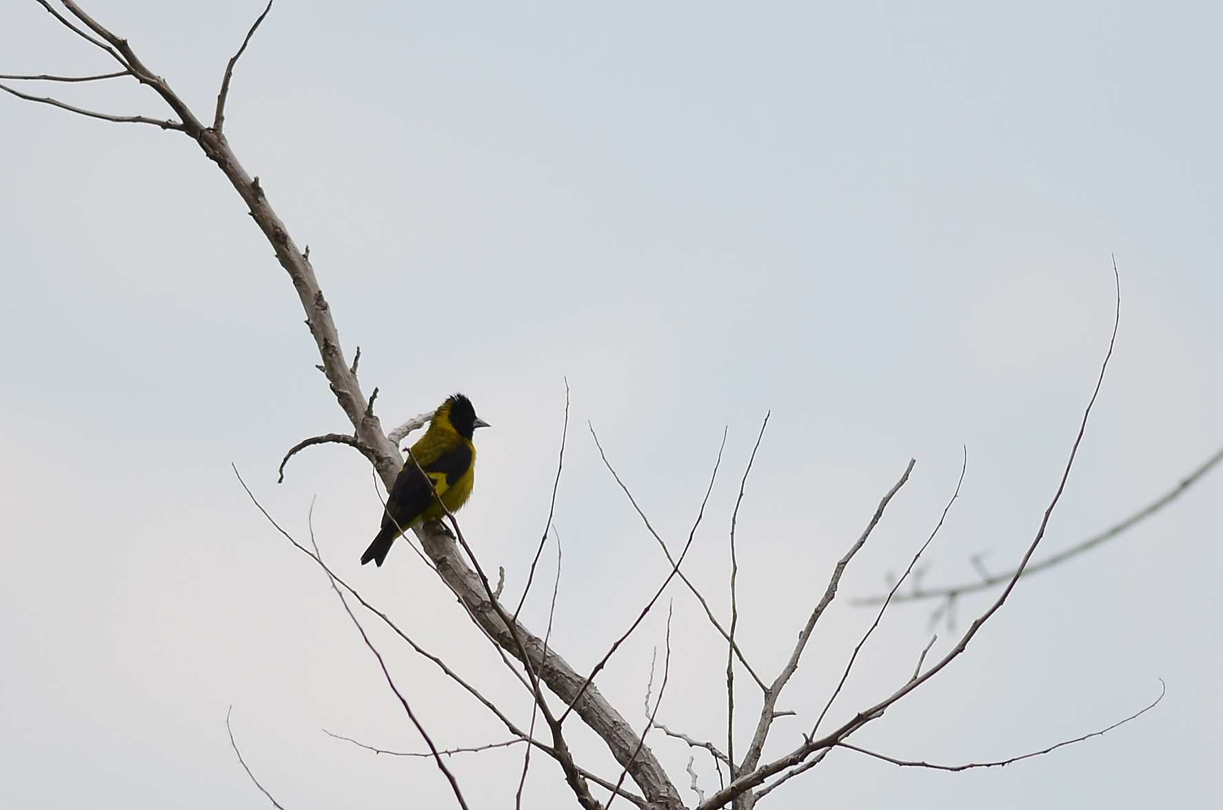 Tepoztlán, Morelos, México. Agosto 2013